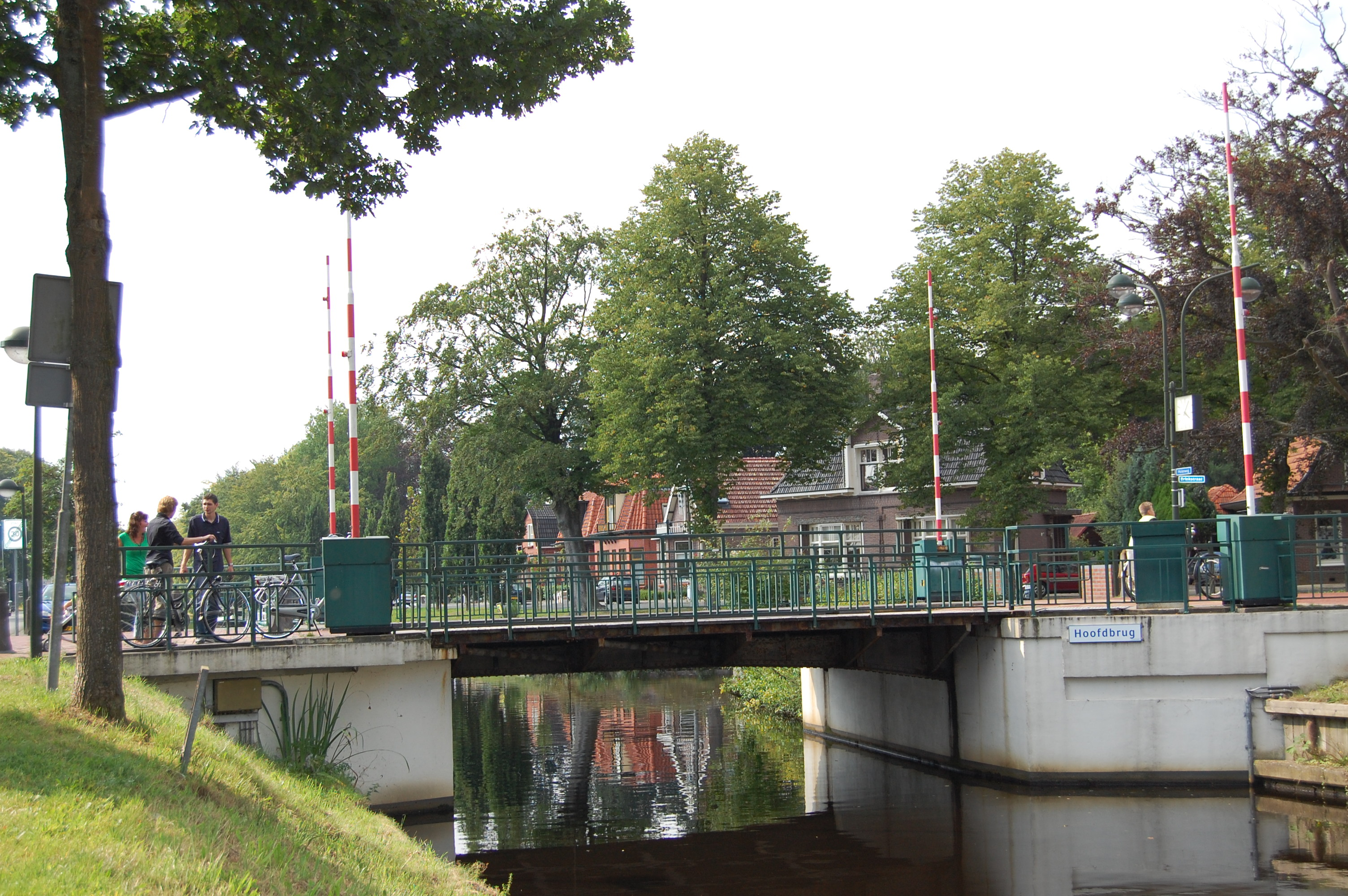 De Hoofdbrug in Oosterwolde over de Opsterlandse-Compagnievaart.